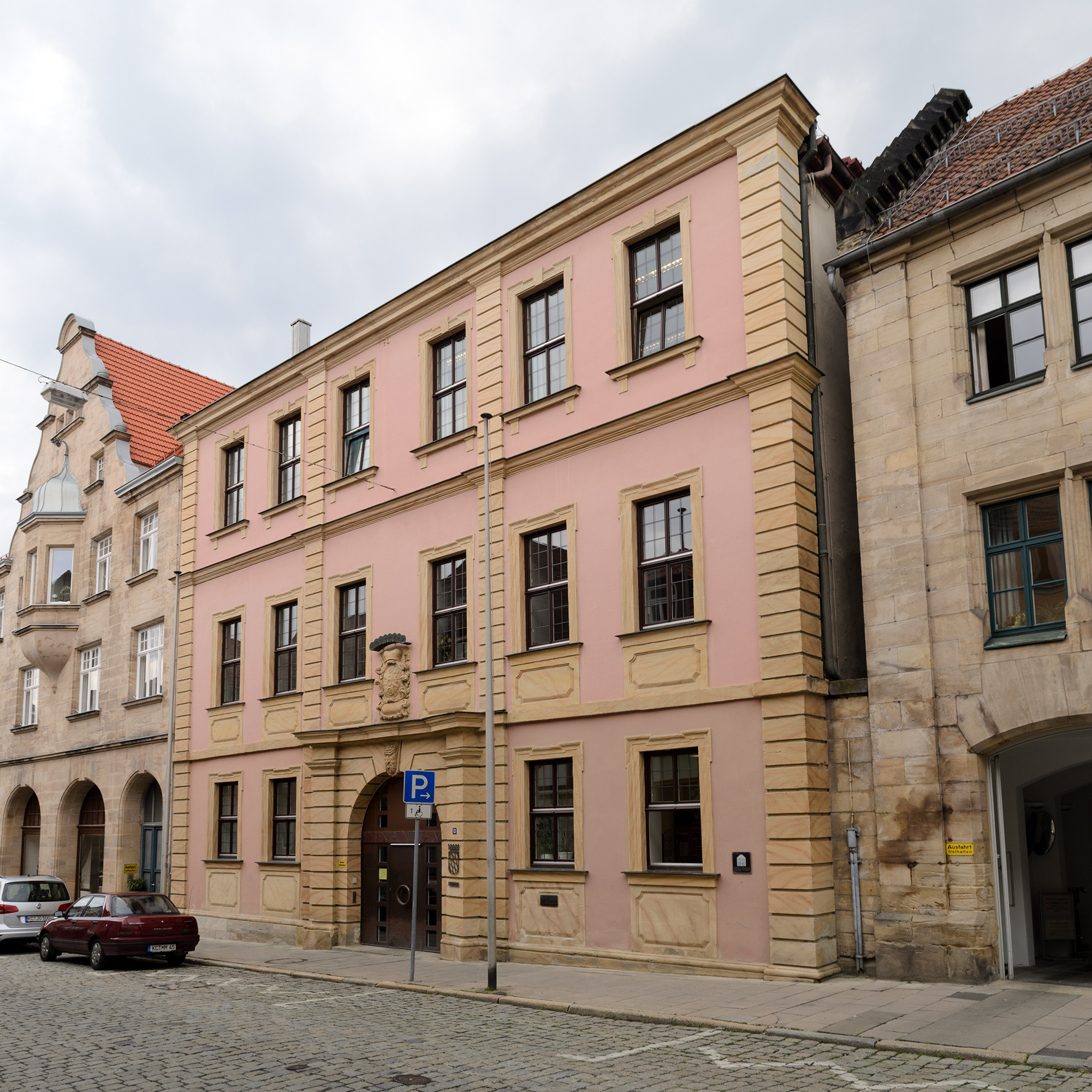 Gebäude Amtsgerichtsstraße 13 in Kronach, ehemaliges fürstbischöfliches Kastenamt, heute Finanzamt